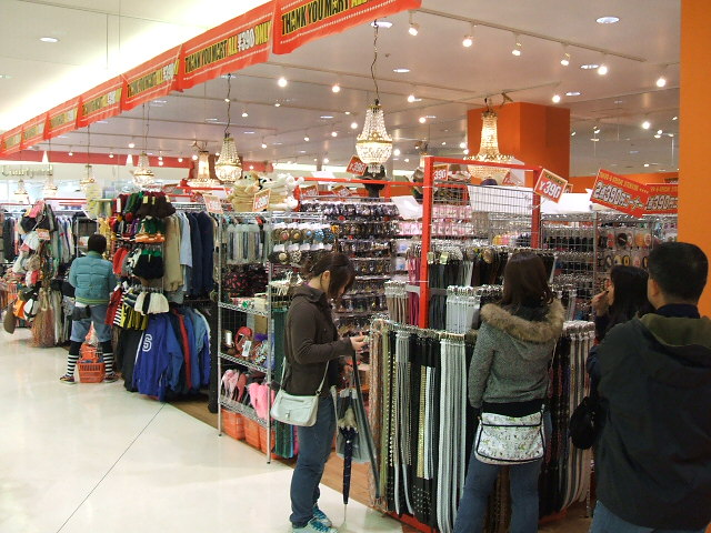 サンキューマート名古屋みなと店（ベイシティ）